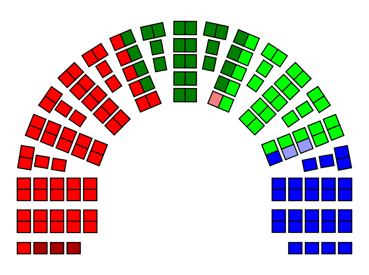 Mandatfordelingen etter Stortingsvalget 1927 illustrert med seter Norges Kommunistiske Parti Arbeiderpartiet Bondepartiet Radikale Folkeparti Venstre Frisinnede Venstre Høyre